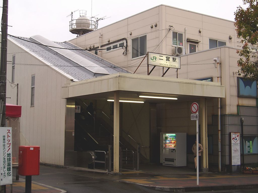 South Exit Ninomiya Station on Tokaido Main Line, Ninomiya, Kanagawa 二宮駅